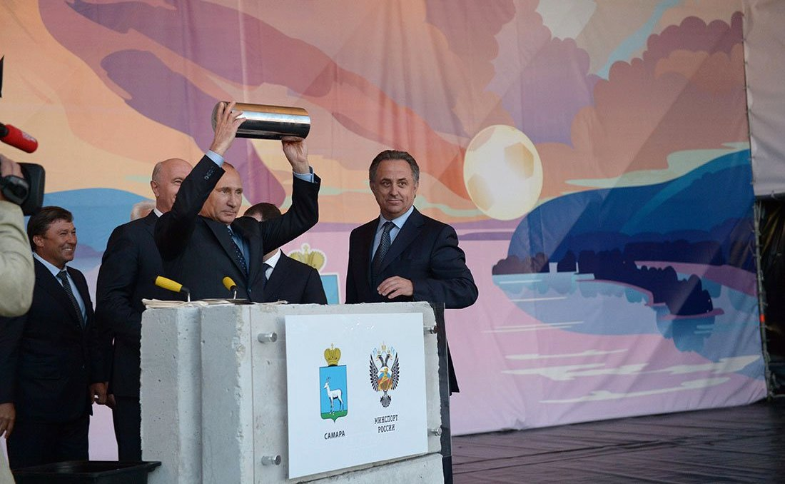 Поездка Президента России Владимира Путина в Самарскую область. На церемонии закладки капсулы с посланием потомкам на стадионе Самары, строящемся к чемпионату мира по футболу 2018 года.